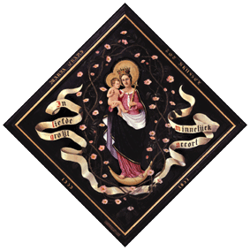 Blazoen van de toneelvereniging De Wijngaard - 't Mariacranske(n). Leuze: "In liefde groijt minnelijck accort". Vermeldt verder: "Maria Crans, Tot Brussel, 1353-1657" (legendarische stichtingsdatum 't Mariacranske et stichtingsdatum toneelgroep De Wijngaard)